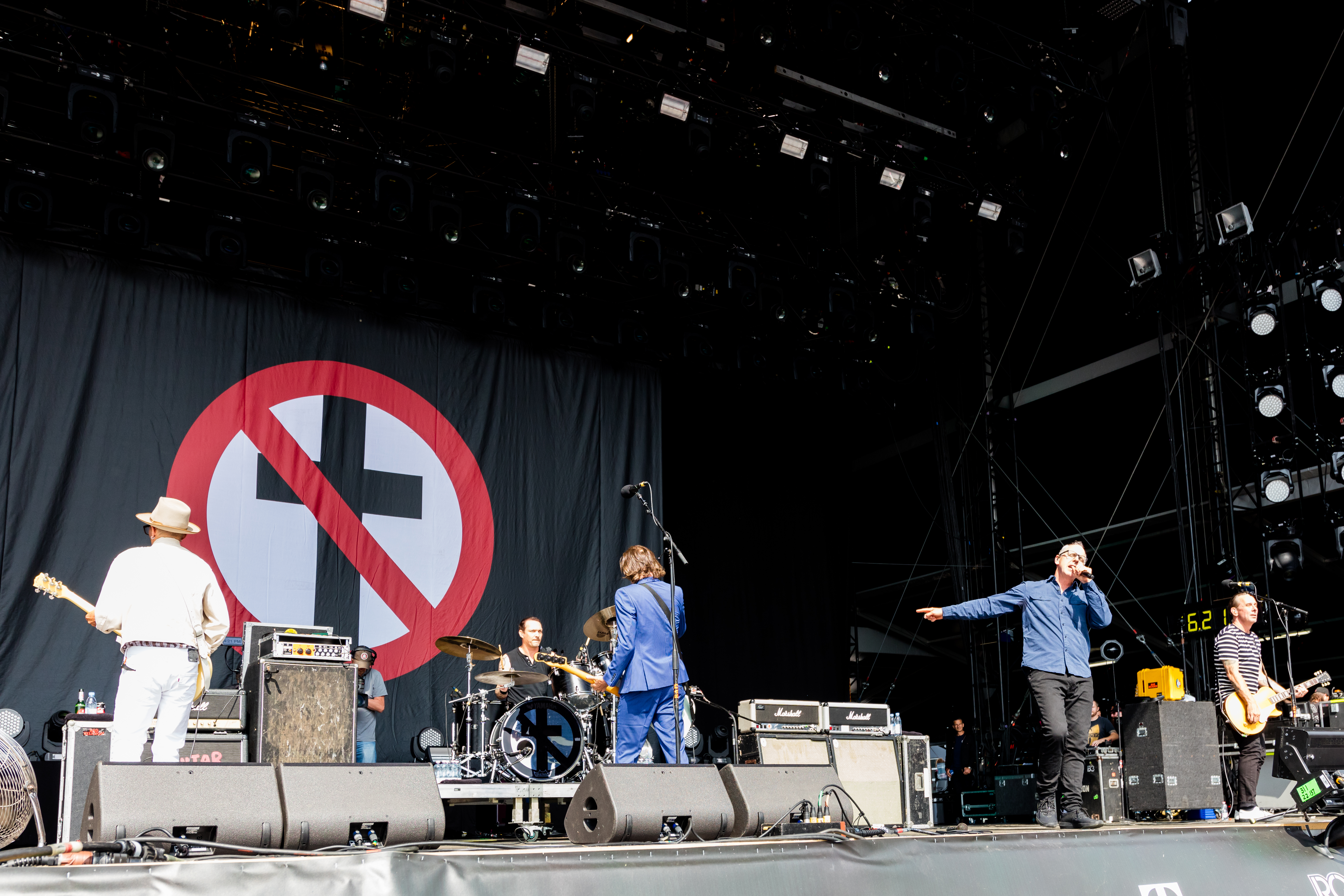 Bad Religion @ Rock am Ring 2018